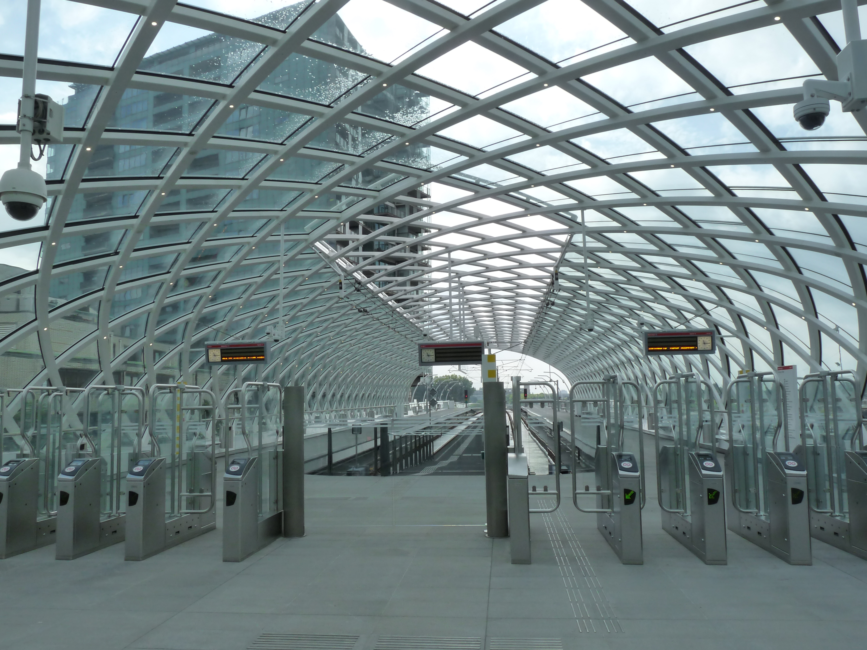 Haags startstation Erasmuslijn (HSE) voor de opening